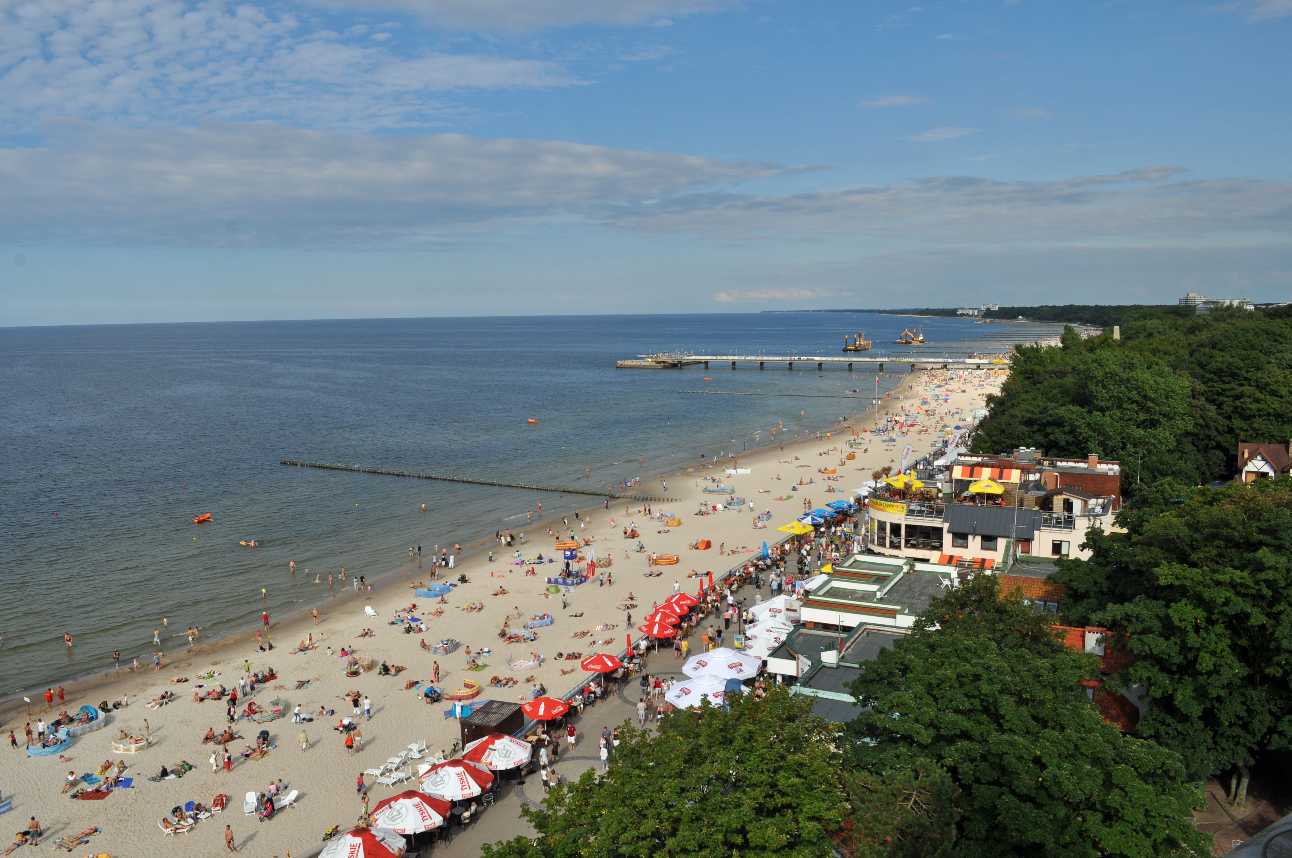 Aufgenommen in Polen im Juli 2011. Die Bilder tragen im Namen Ort und Objekt sowie das Aufnahmedatum.